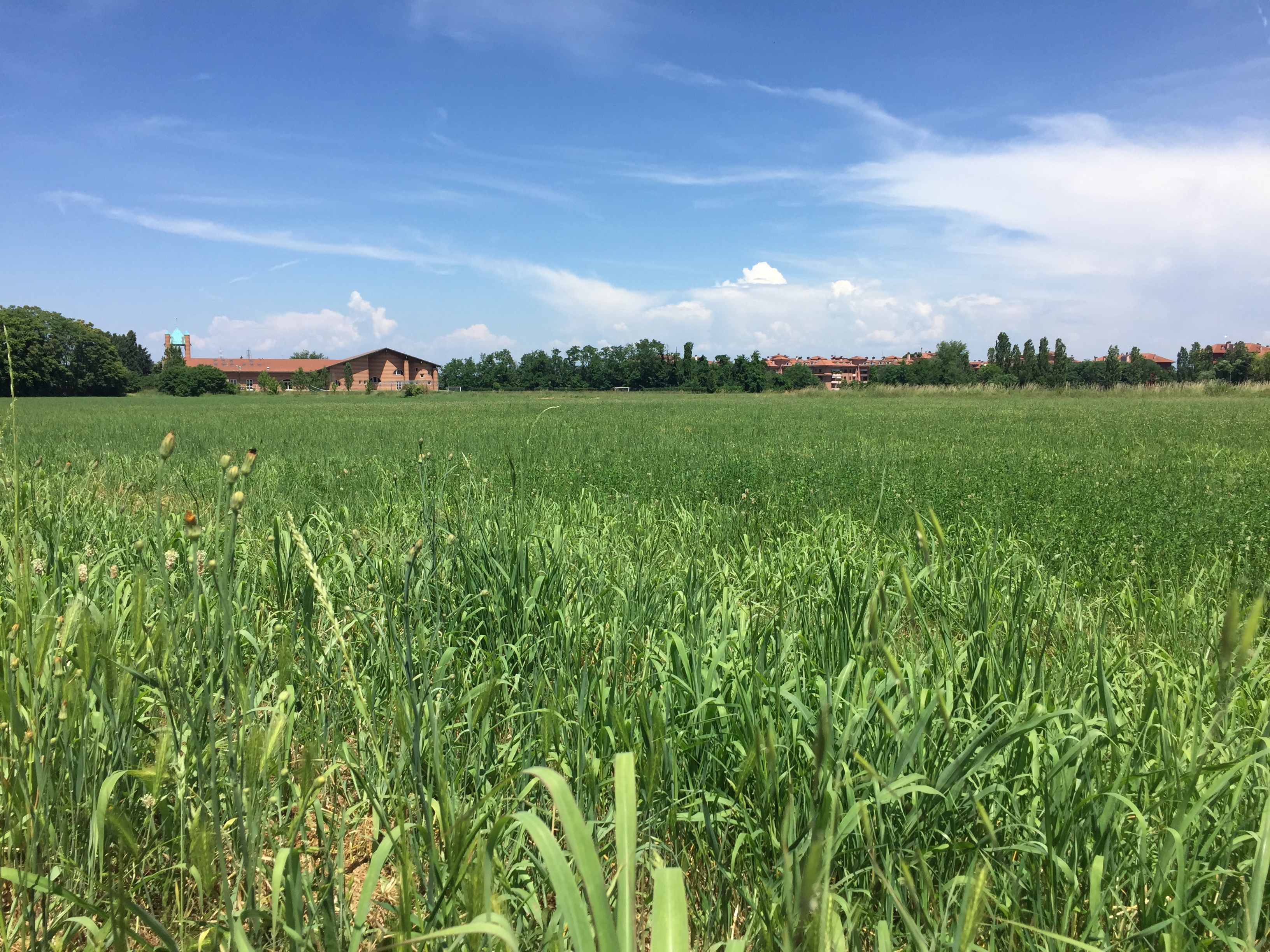 Le champs de bataille s'étend sur 1km carré au sud de Milan. La photo est prise du coté Franco-venetien, sur le lieu supposé de la bataille du 14 au matin.